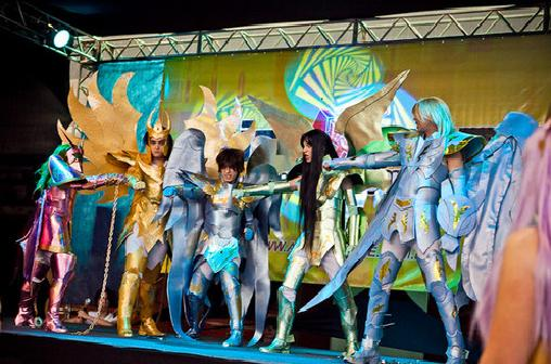 Cosplay de Los Caballeros del Zodiaco